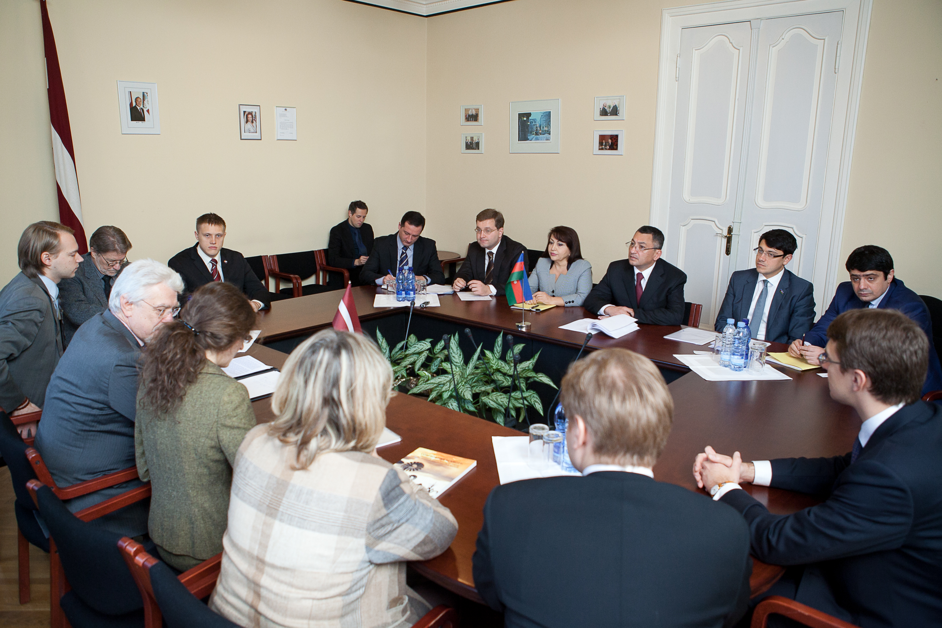 2012.gada 6.novembris. Ārlietu komisijas priekšsēdētājs Ojārs Ēriks Kalniņš un komisijas deputāti tiekas ar Azerbaidžānas Republikas Milli medžilisa Azerbaidžānas - Latvijas parlamentu sadarbības grupu. Foto: Ernests Dinka, Saeimas Kanceleja